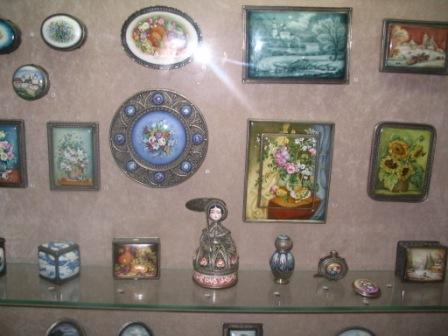 Финифть